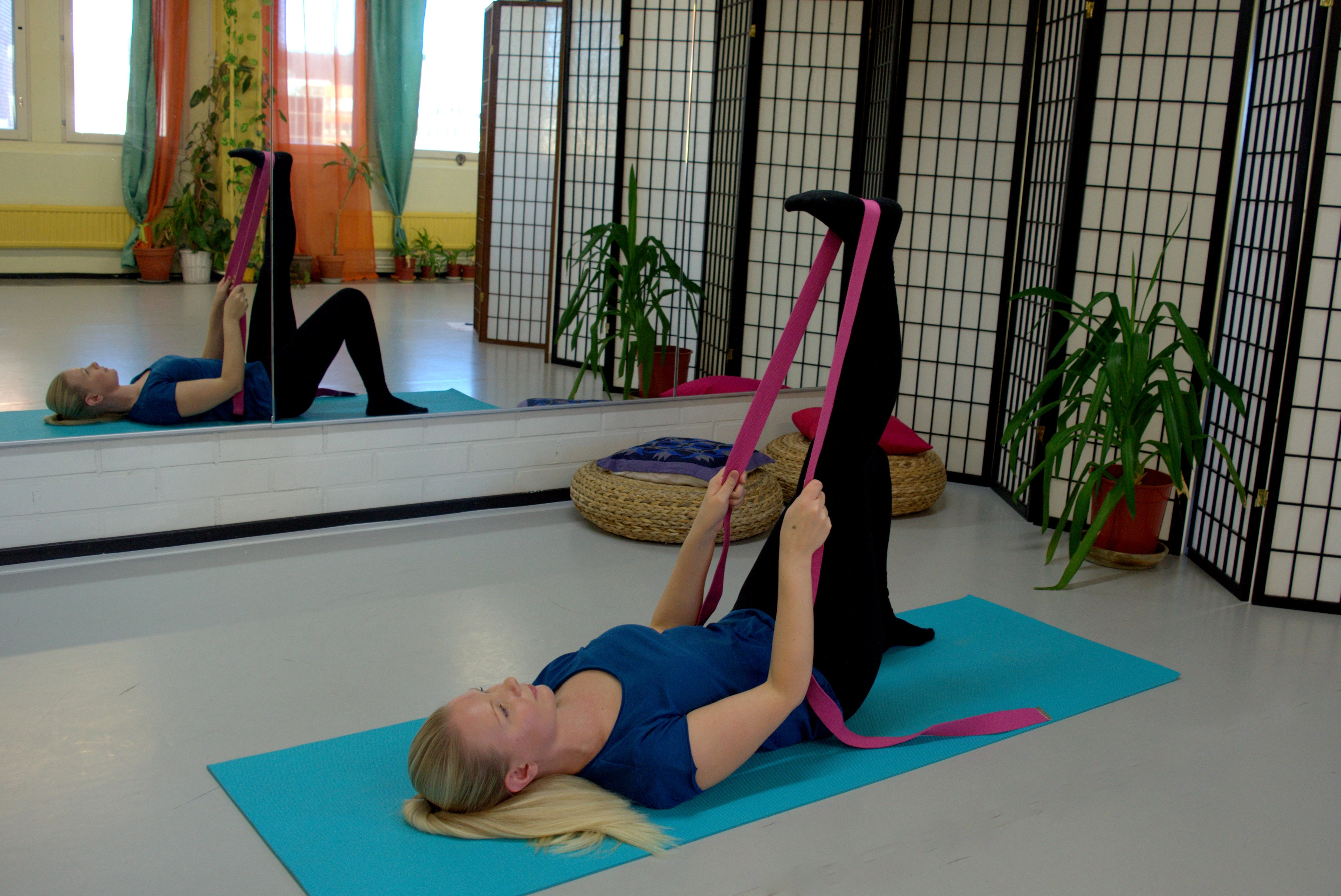 Takareiden venyttely nauhan kanssa